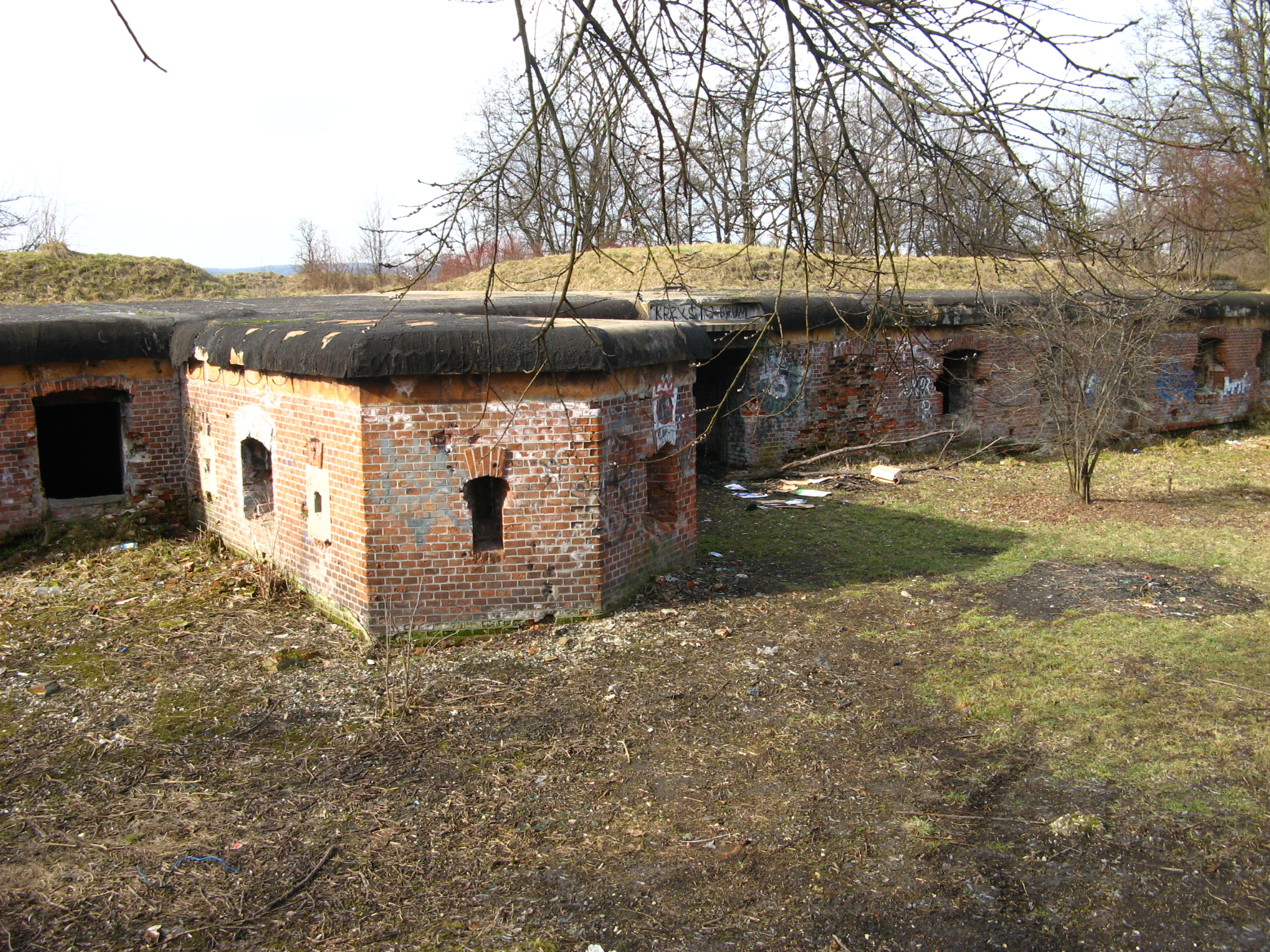 Česky: Pomocná pěchotní tvrz 41a Mydlniki, na východním předměstí Krakova